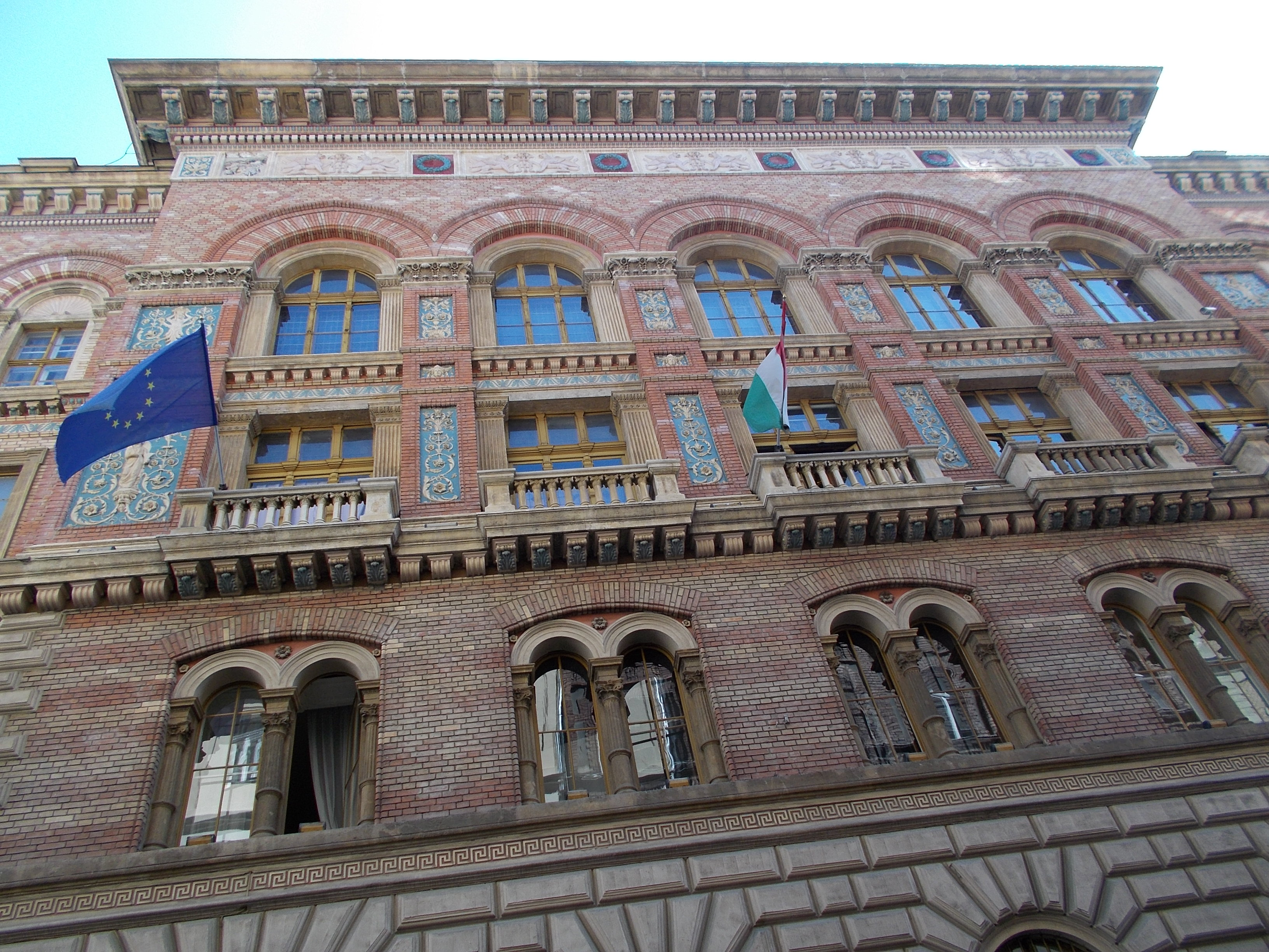 'Újvárosháza.' Ablakok és zászlók. Háromemeletes, eklektikus középület. Mázas-kerámia díszítések, Marhenke Vilmos munkái A harmadik emeleti ablakok fölé kagylómotívumú díszeket illesztettek. A középső részen a második és a harmadik emeleten, az ablakközi falmezőkbe színezett kerámia díszeket Műemlék ID 646 - Budapest V., Váci utca 62-64. . This is a photo of a monument in Hungary. Identifier: 646